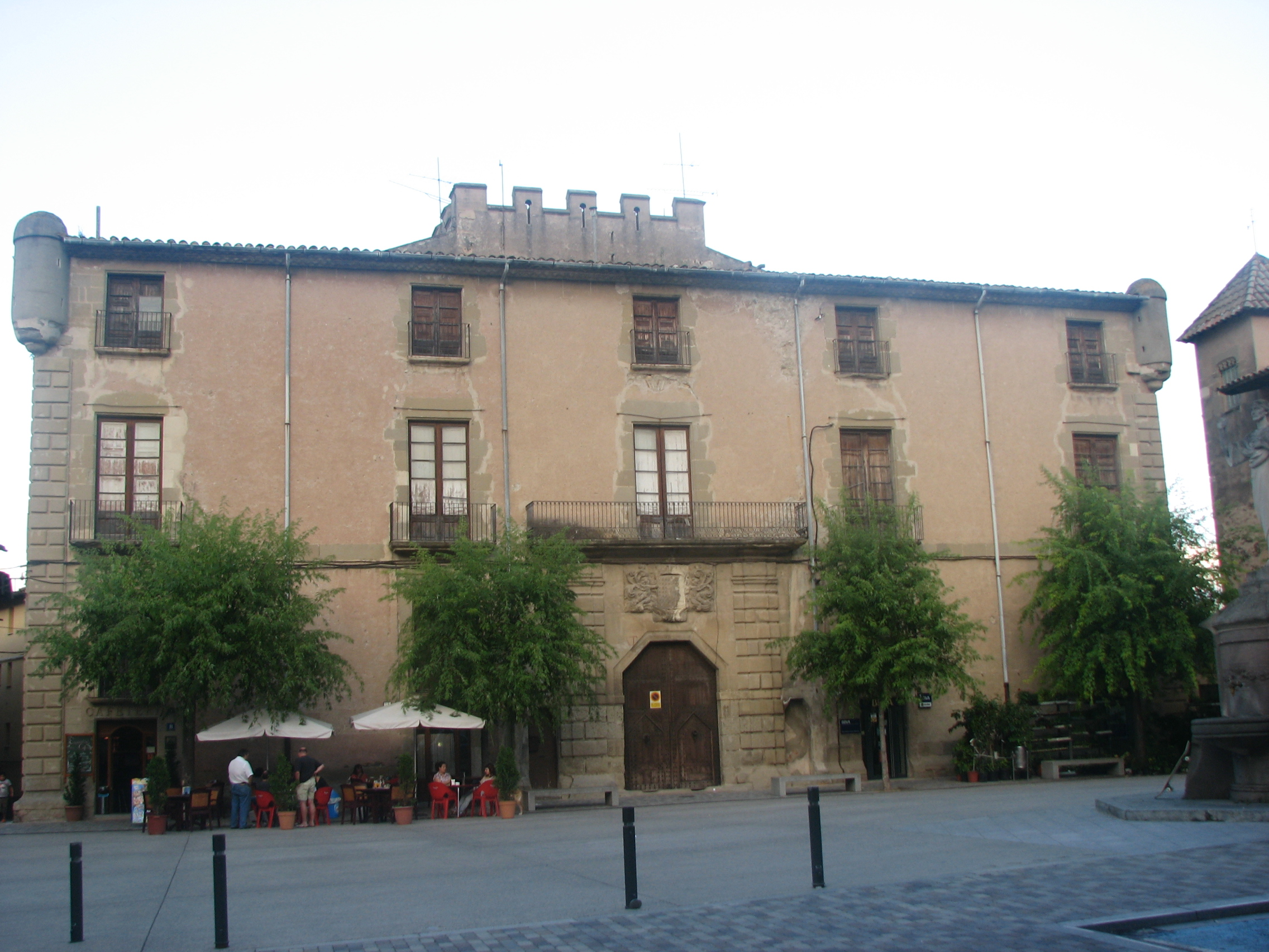 Palau Comtal (Centelles)